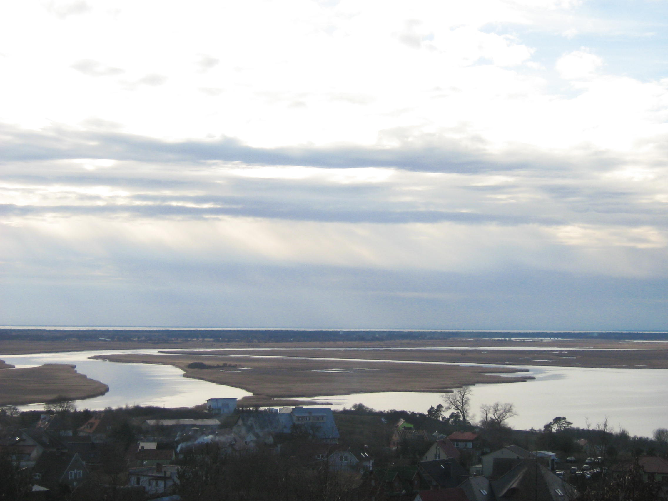 Delta wsteczna Świny widziana z punktu widokowego - wzgórza Zielonka w Lubinie